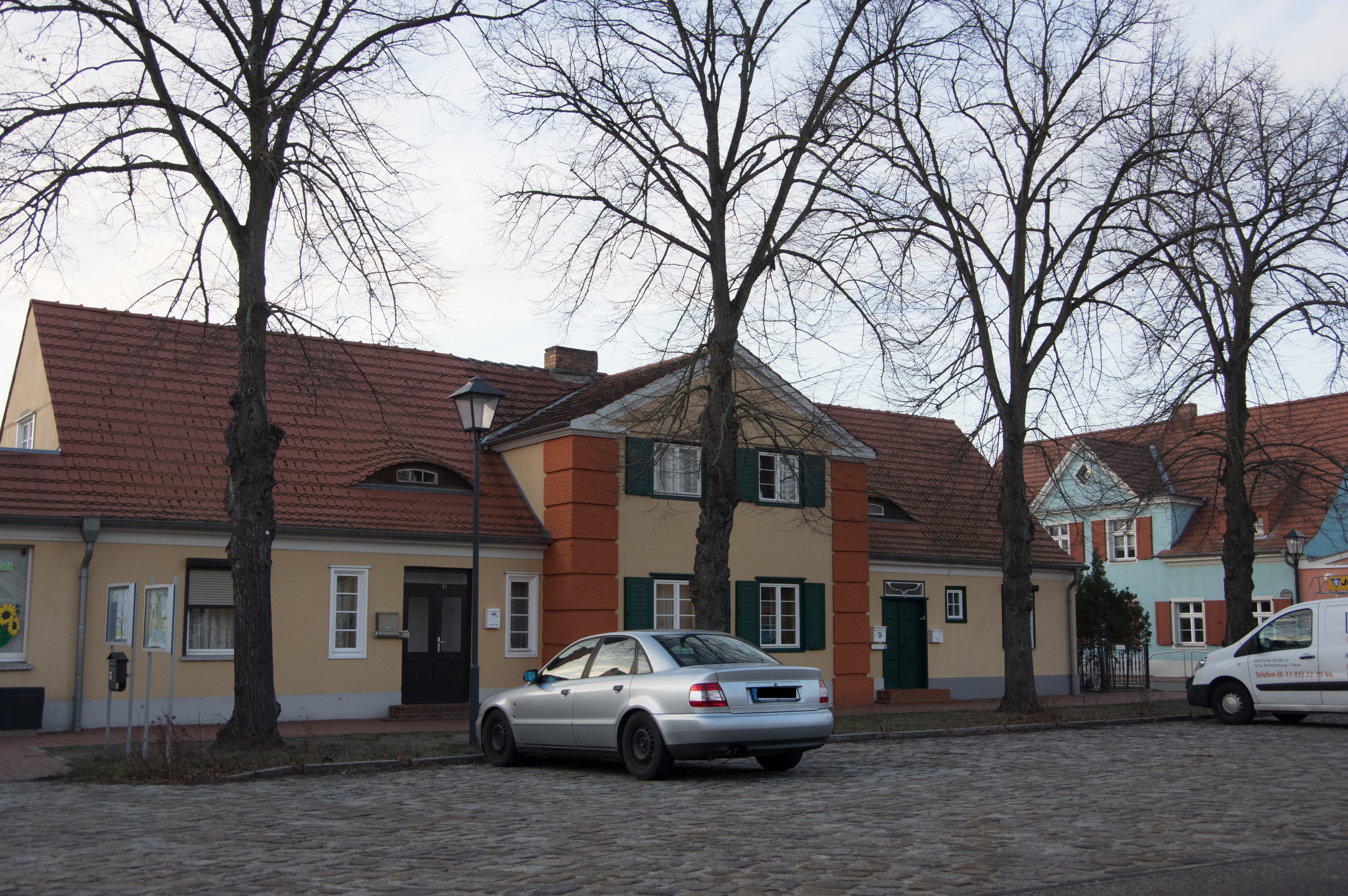 Brandenburg an der Havel, Ortsteil Plaue. Die Gartenstadt steht unter Denkmalschutz.